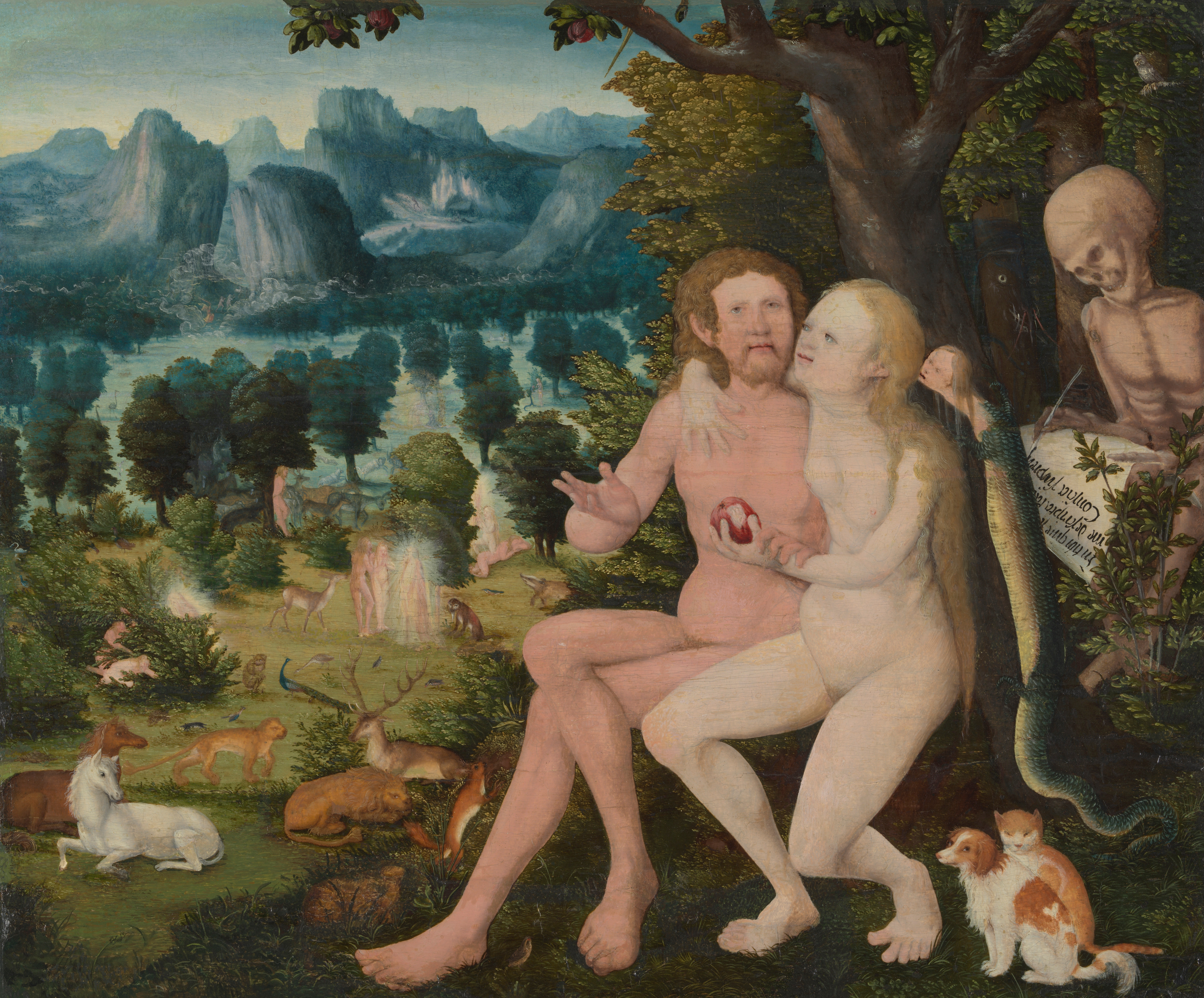 Genesis 3:6